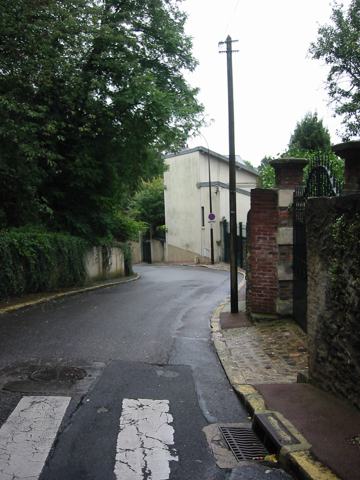 Rue Georges Bonnefous à Sèvres, atelier.